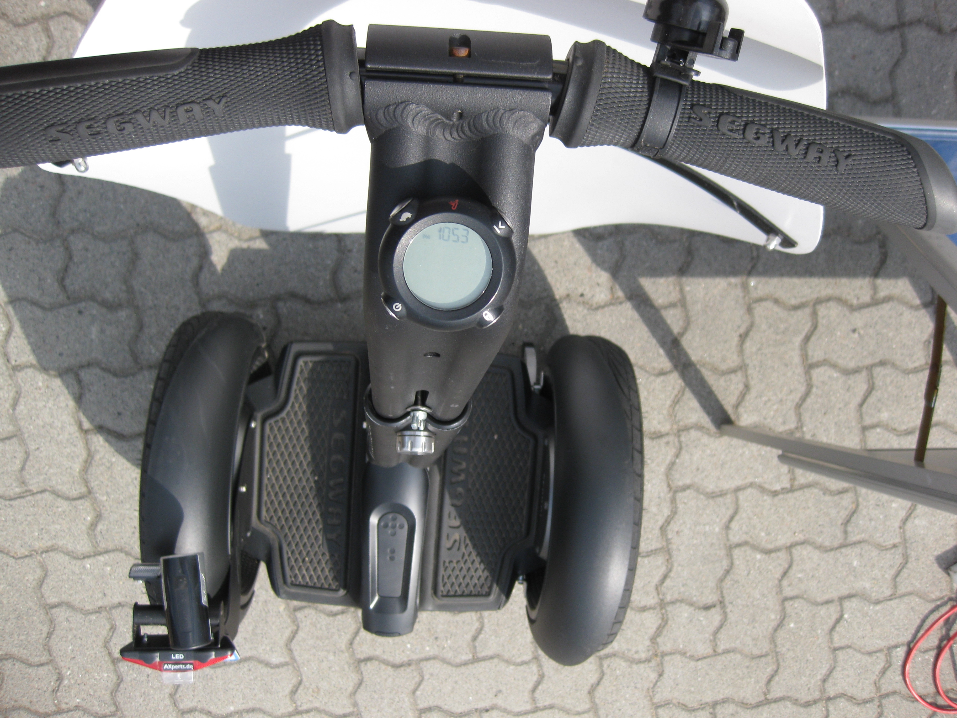 Segway Draufsicht